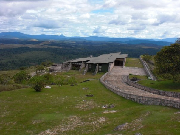 Kavanayen (Gran Sabana) en el Parque Nacional Canaima, Estado Bolívar - Venezuela